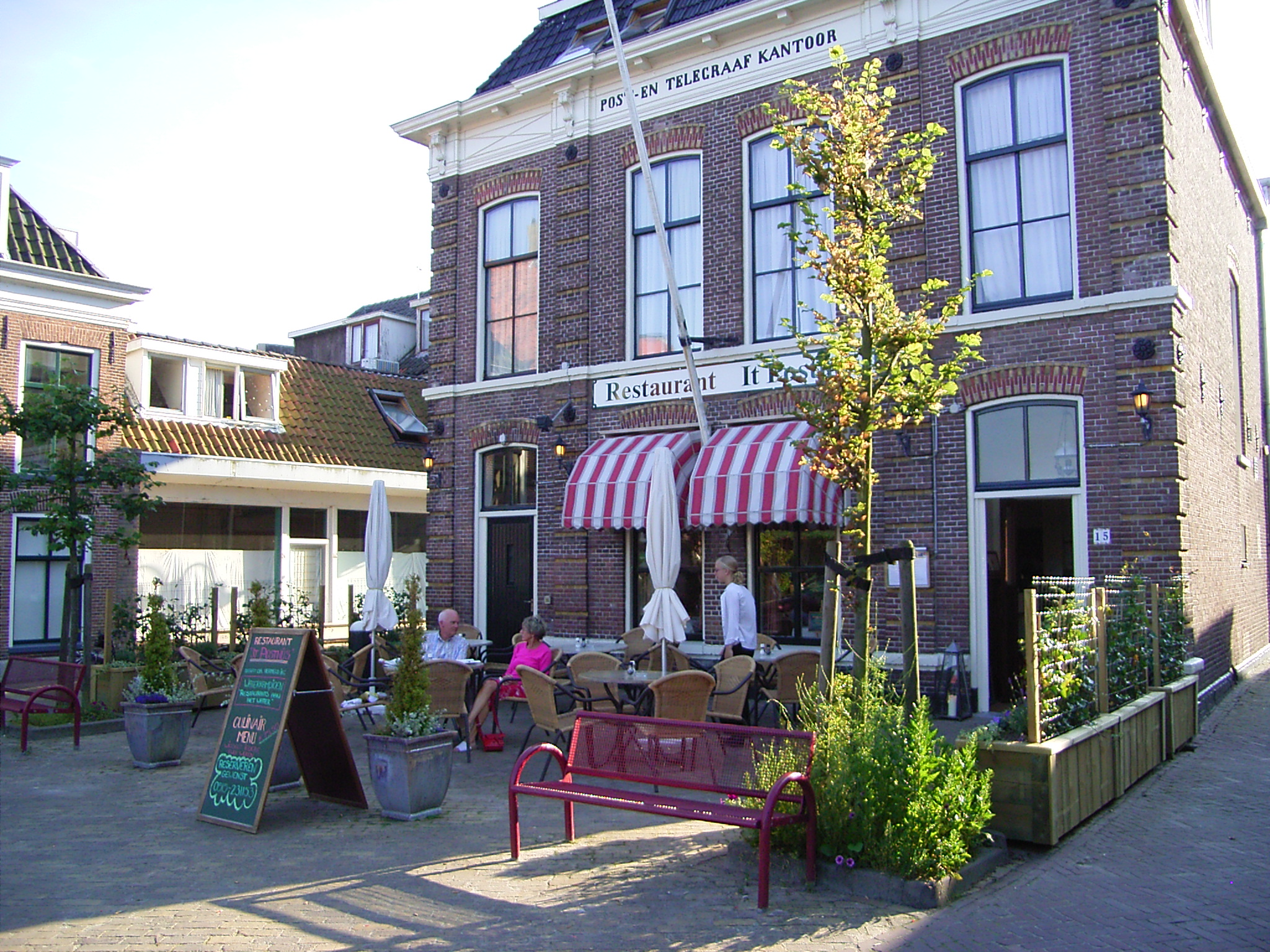 Voormalig Postkantoor, nu restaurant, in Makkum